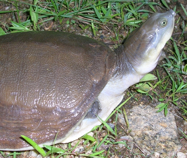 Lissemys punctata, Bannerghatta Rehabilitation Centre, Bangalore